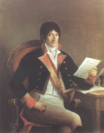 Retrato del marino y politico español Pedro Agar y Bustillo (1763-1822), que alcanzó el grado de jefe de escuadra de la Real Armada Española y fue regente de España en diversos periodos durante la Guerra de la Independencia Española.